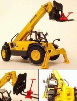 Modelauto van Universal Hobbies.